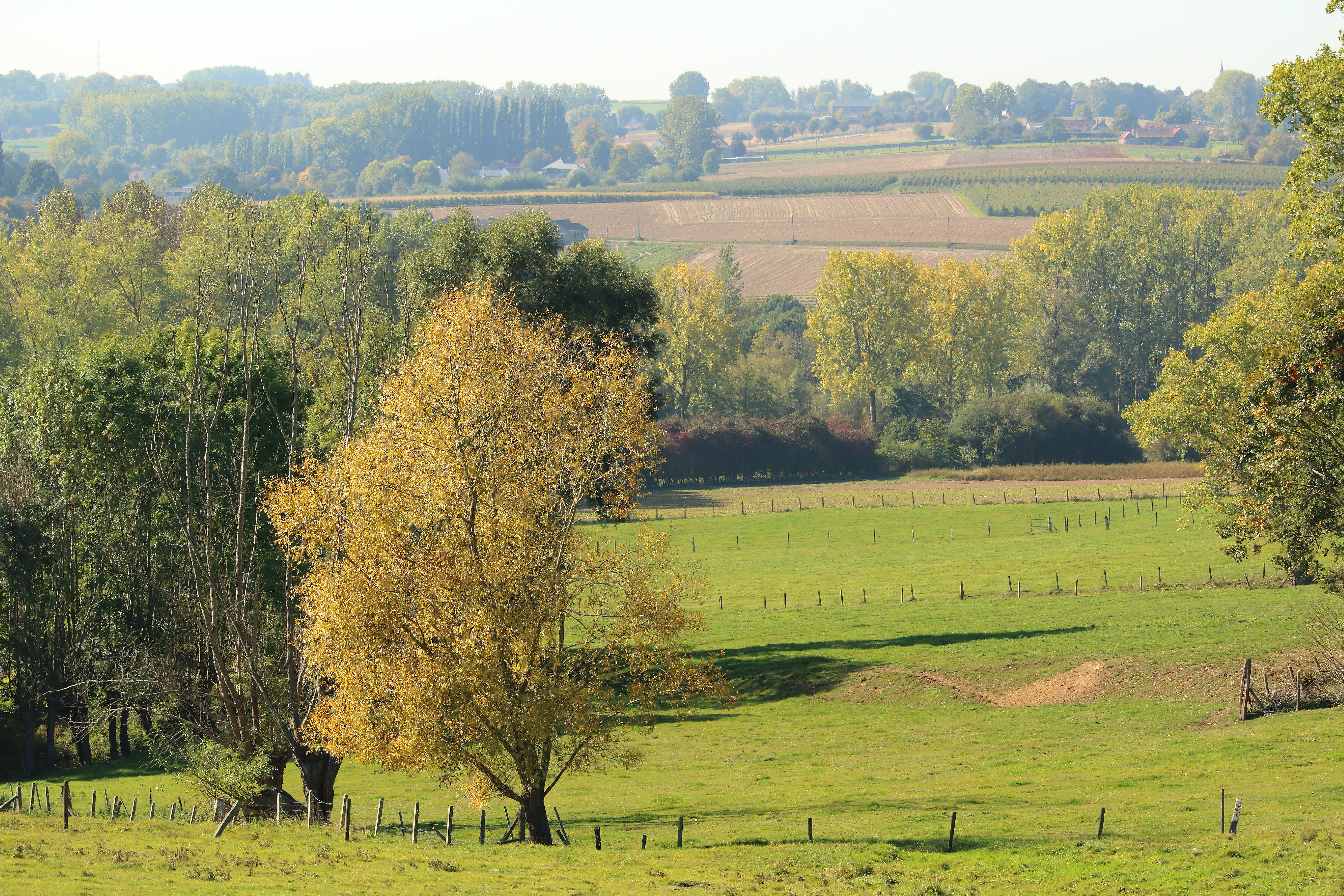 Vlaamse Ardennen, Sint-Goriks-Oudenhove, Zottegem, Vlaanderen, België